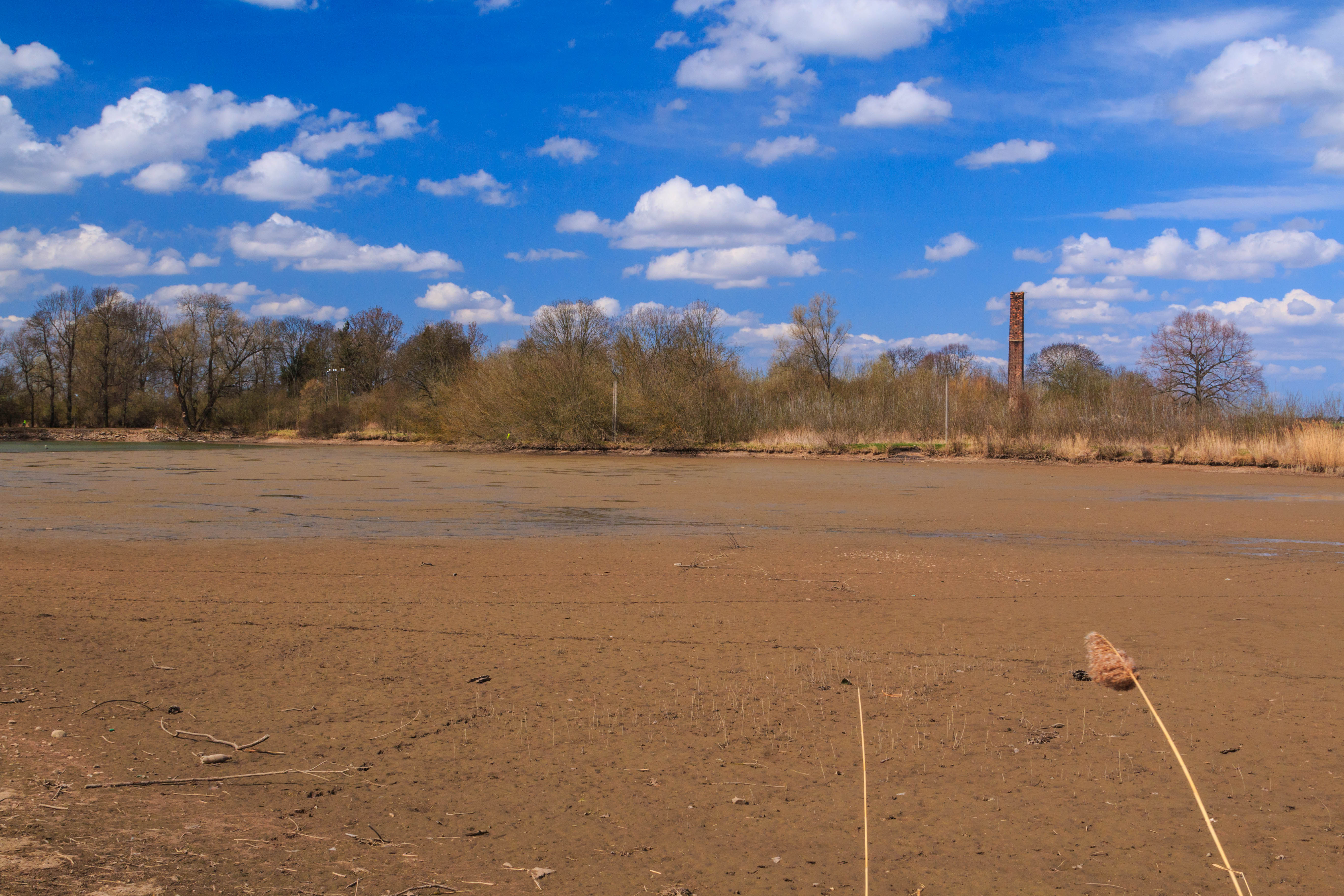 Stihnovský rybník u Skřivan Project: Vodstvo.